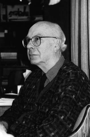 Matthew Lipman al seu despatx al IAPC, NJ. 1997.